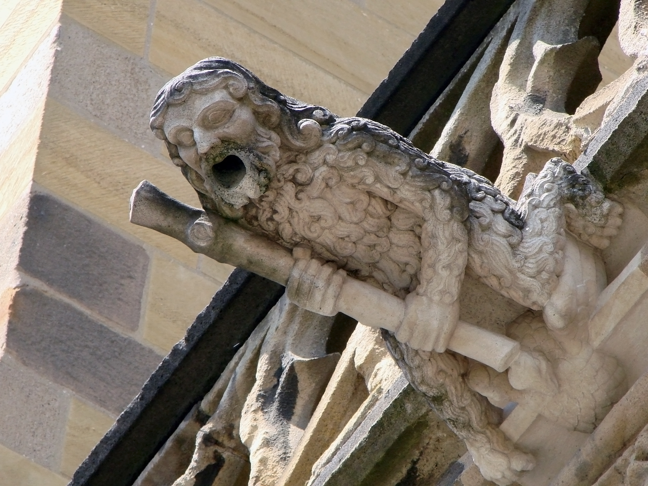 Gargouille de la cathédrale Notre-Dame de l'Annonciation de Moulins. L'homme sauvage.